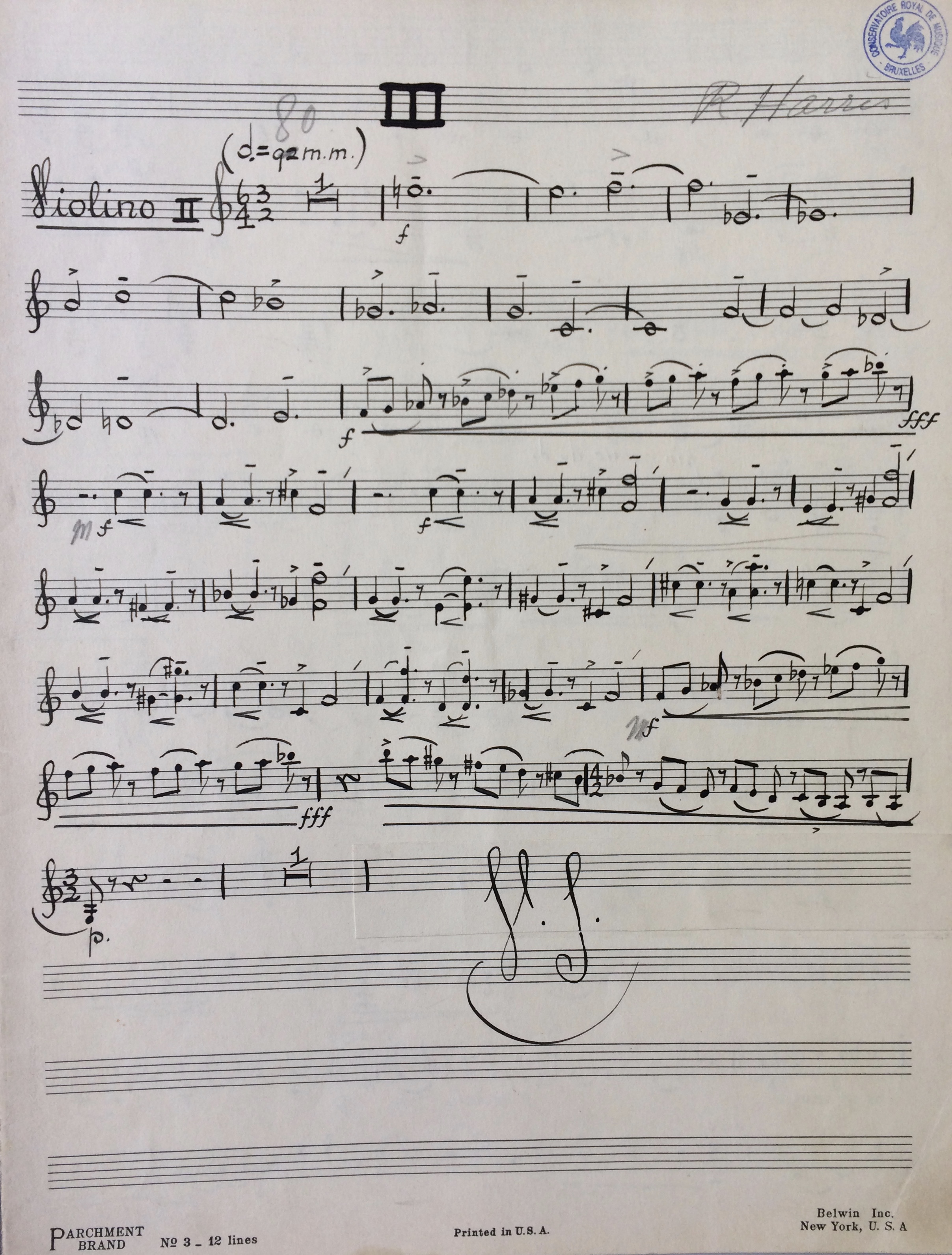 Roy Harris, Quatour n°2, version 2 (Bibliothèque du Conservatoire royal de Bruxelles, B-Bc, CR-02083)